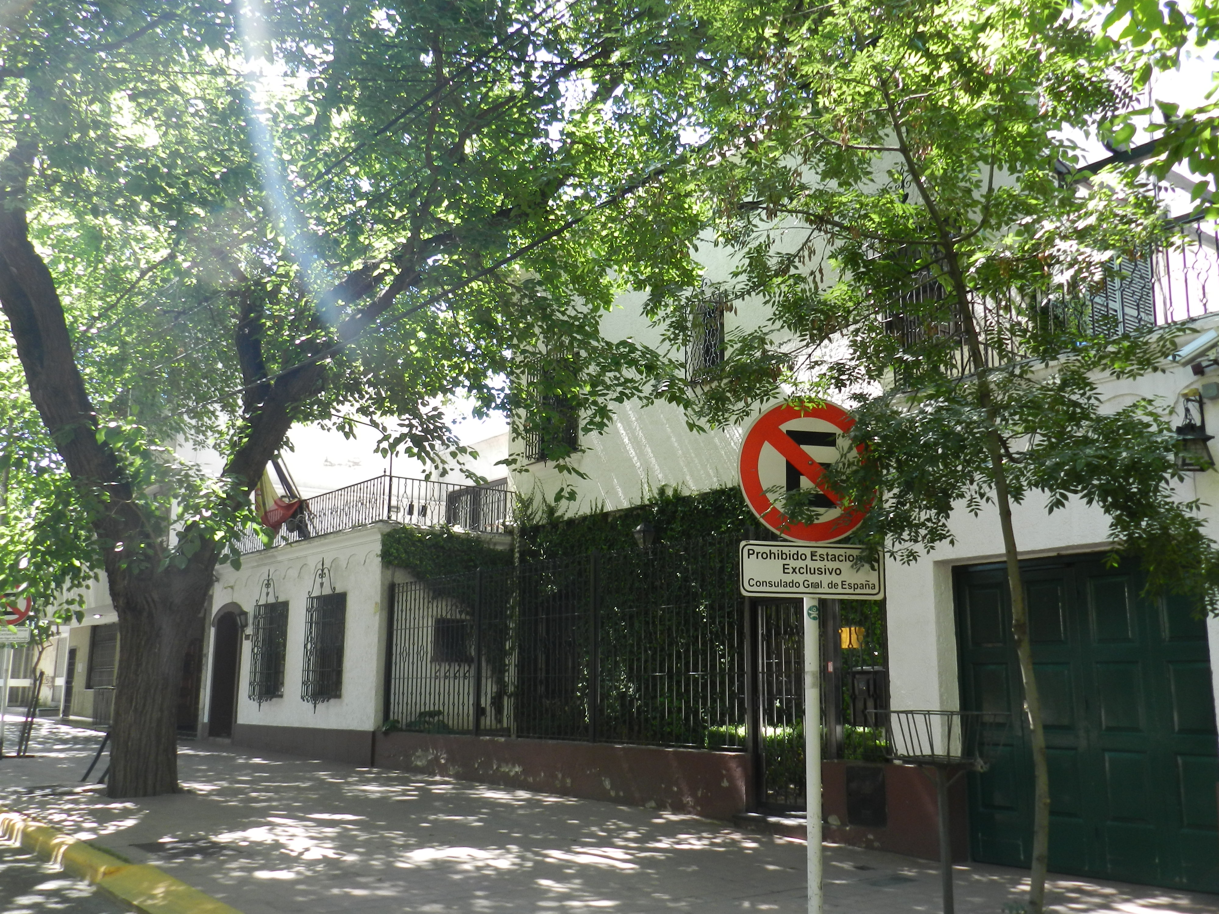 Sede del Consulado General de España en Mendoza, Argentina.